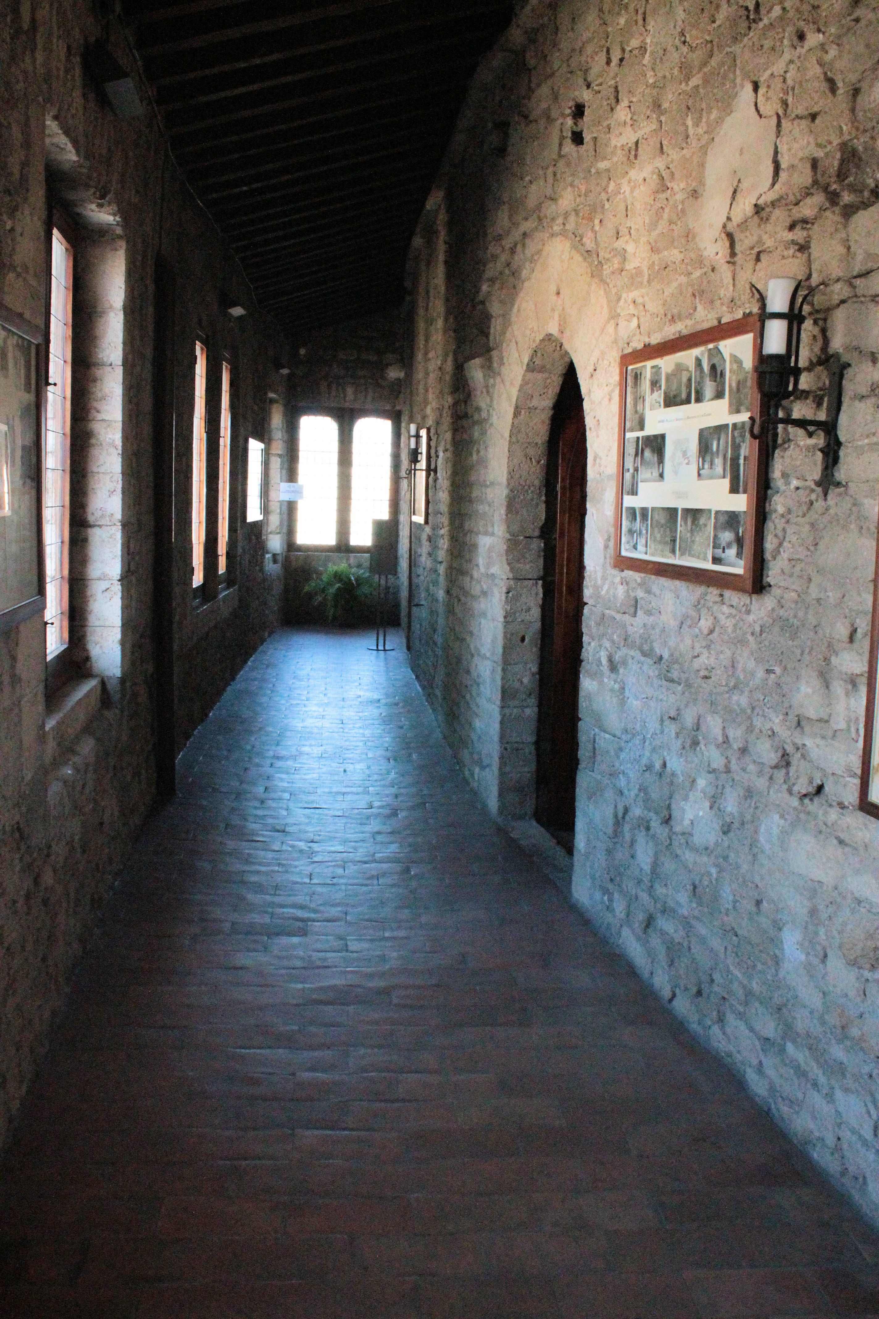 Loggetta, foto scattata in occasione dell'editathon tenutosi ad Anagni (FR) il 29-30 aprile 2017